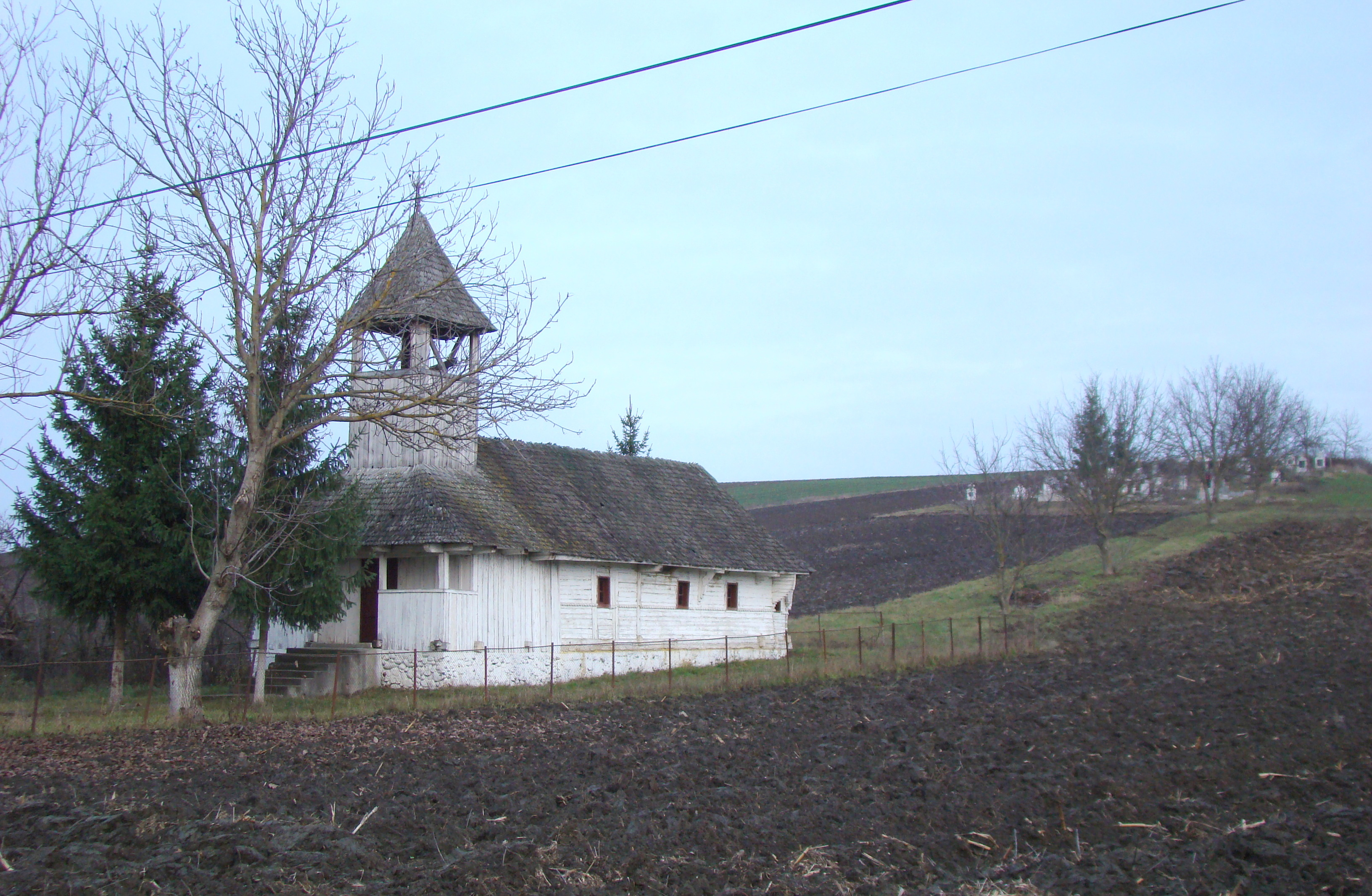 Biserica de lemn „Sf.Arhangheli” din Mădărășeni, județul Mureș